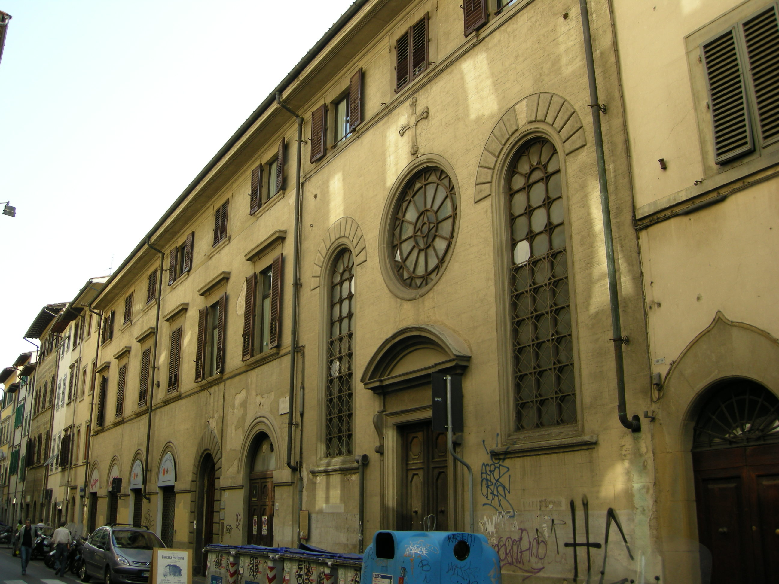 Palazzo Riscasoli-Salviati, Sitz des Istituto Gould in Florenz; Namensnennung nach der Philanthropin Emiliy Gould Bliss (1825-1875), Ehefrau eines amerikanischen Arztes Dr. Gould